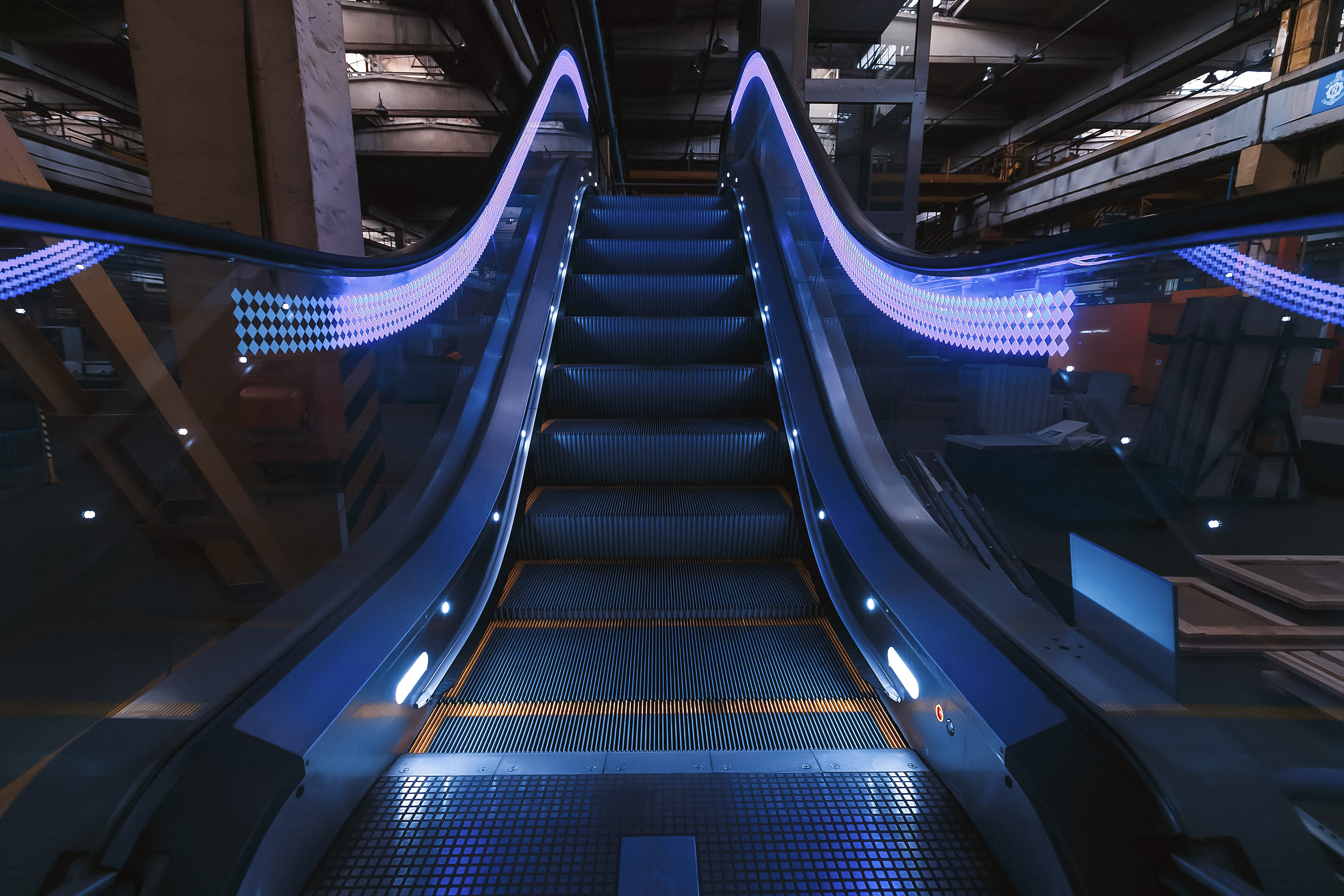 Первый эскалатор, выпущенный ОАО Могилевлифтмаш в 2017 году Першы эскалатар, выпушчаны ААТ Магілёўліфтмаш ў 2017 годзе